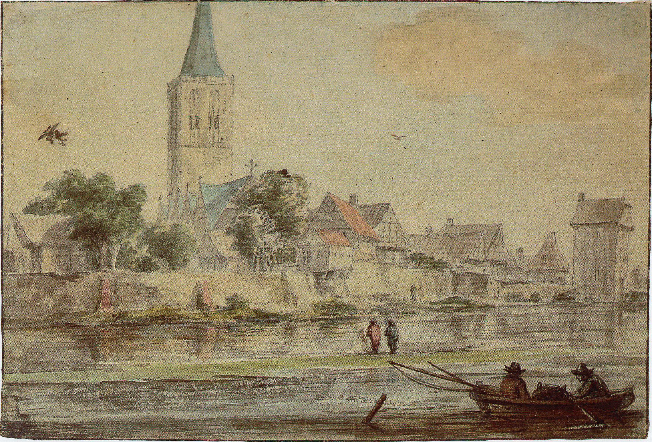 Ansichten der Stadt Schüttorf von Osten